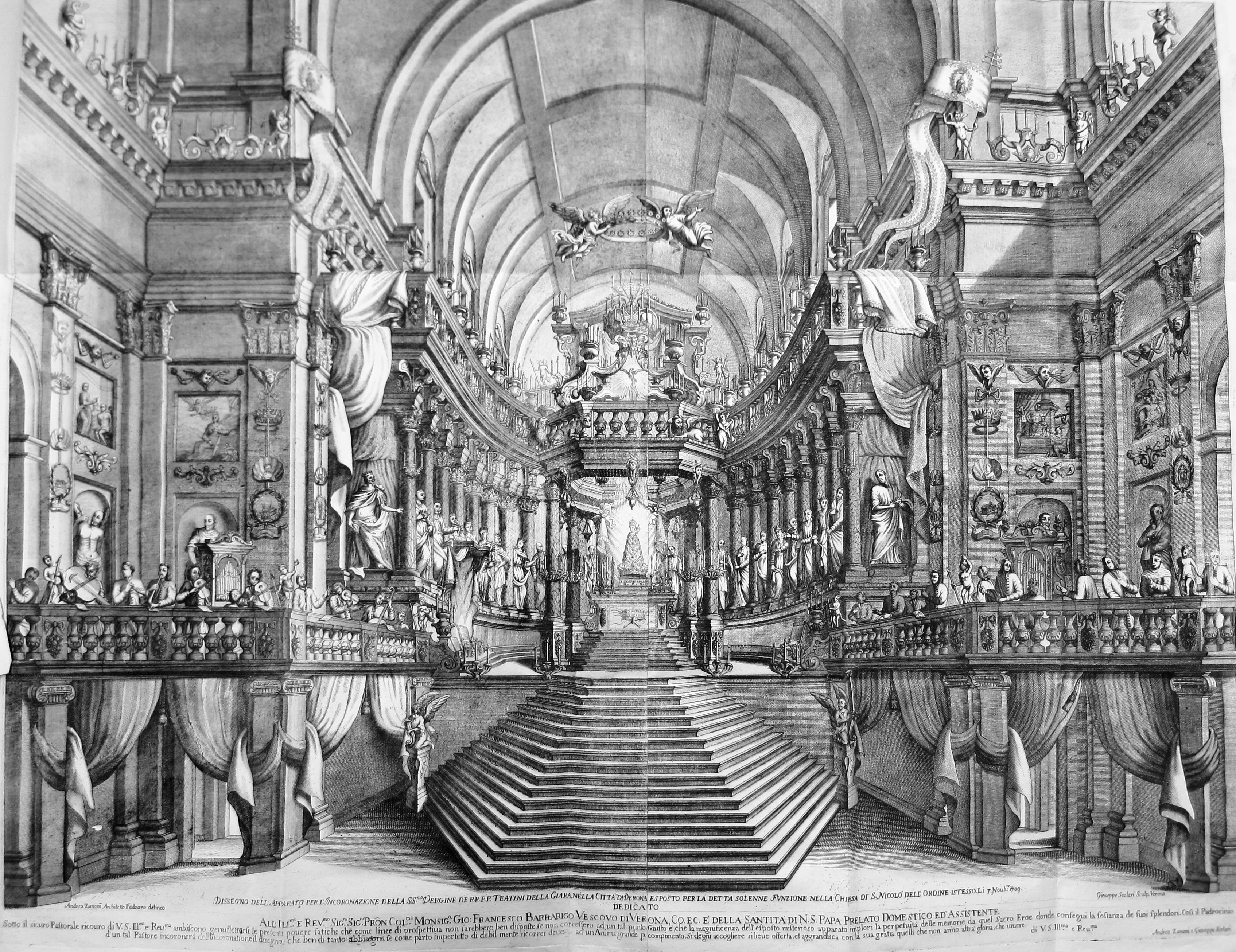 Interno della Chiesa di San Nicolò (Verona) con la scenografia costruita in occasione dell'Incoronazione della Madonna Lauretana. In BENONI G., La maestà coronata componimento istorico-panegirico diviso in molti discorsi fondati sopra l'istoria della solennissima coronazione della sagrata immagine della Santissima Vergine Maria di Loreto della Giara in Verona, Stamperia del Seminario, Padova 1714